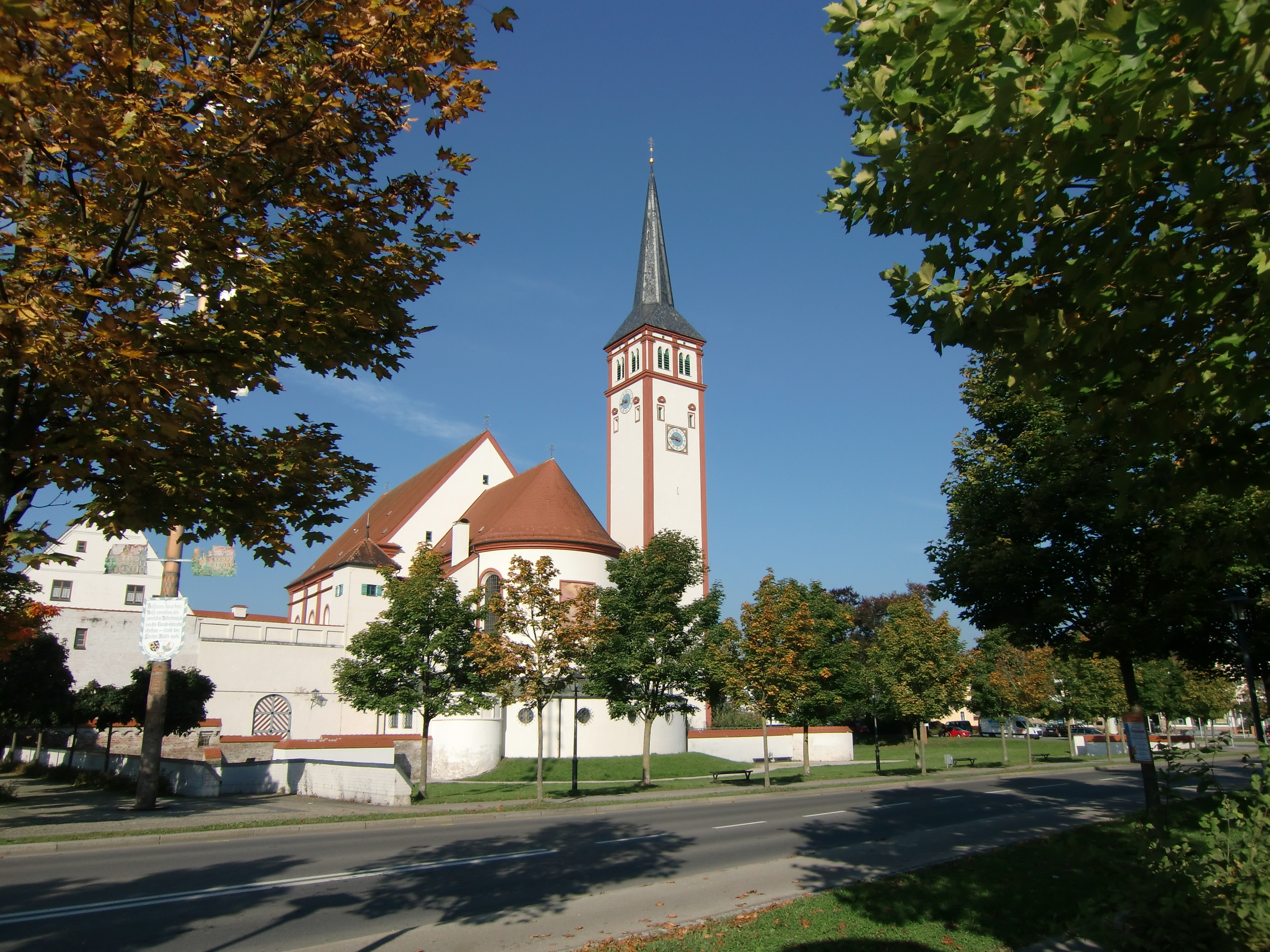 Kath. Kirche St. Stephan